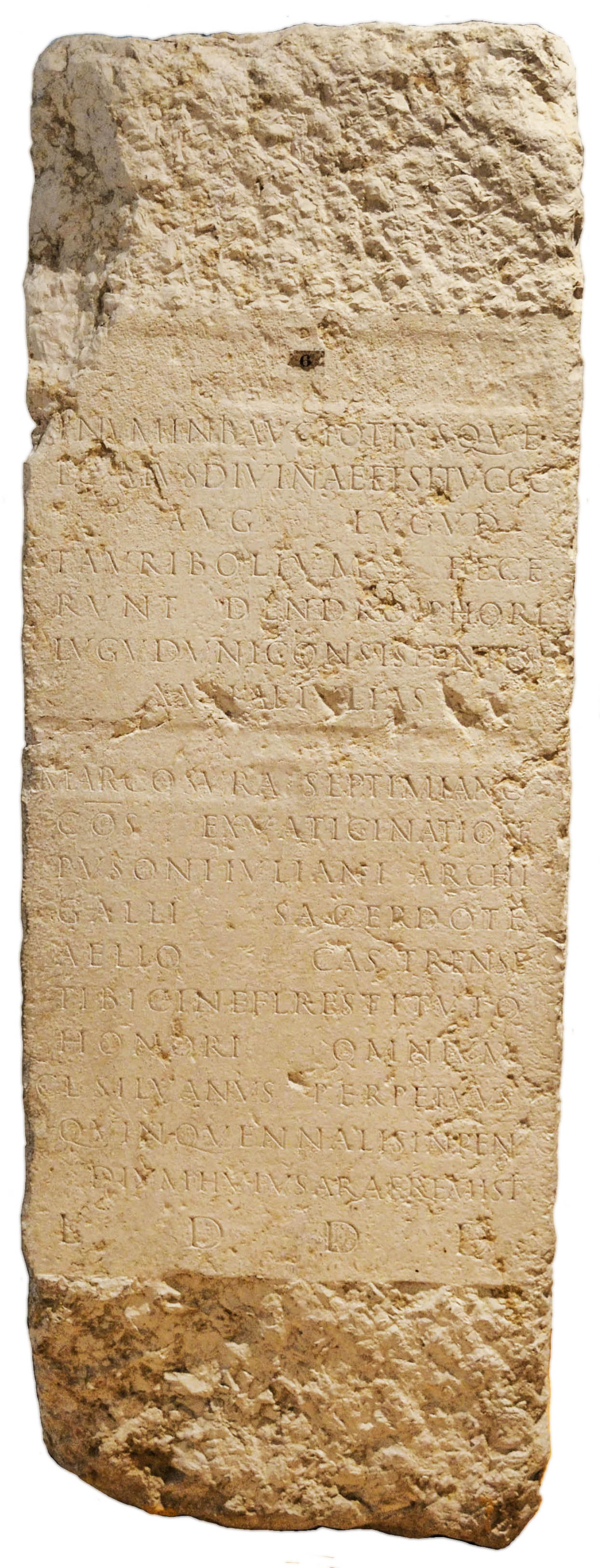 Autel taurobolique de 190, musée gallo-romain de Fourvière, Lyon (CIL XIII 1752).